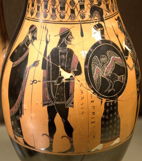 Herakles entering Olympus.